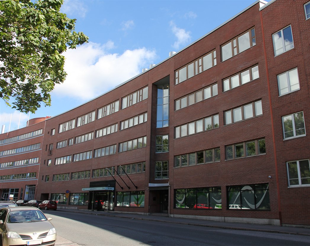 Liikenteen turvallisuusvirasto Trafin pääkonttori Helsingin Vallilassa, osoitteessa Kumpulantie 9. Trafin tehtävänä on vastata liikenteen sääntely- ja valvontatehtävistä, kehittää liikenteen turvallisuutta sekä vähentää sen ympäristöhaittoja.